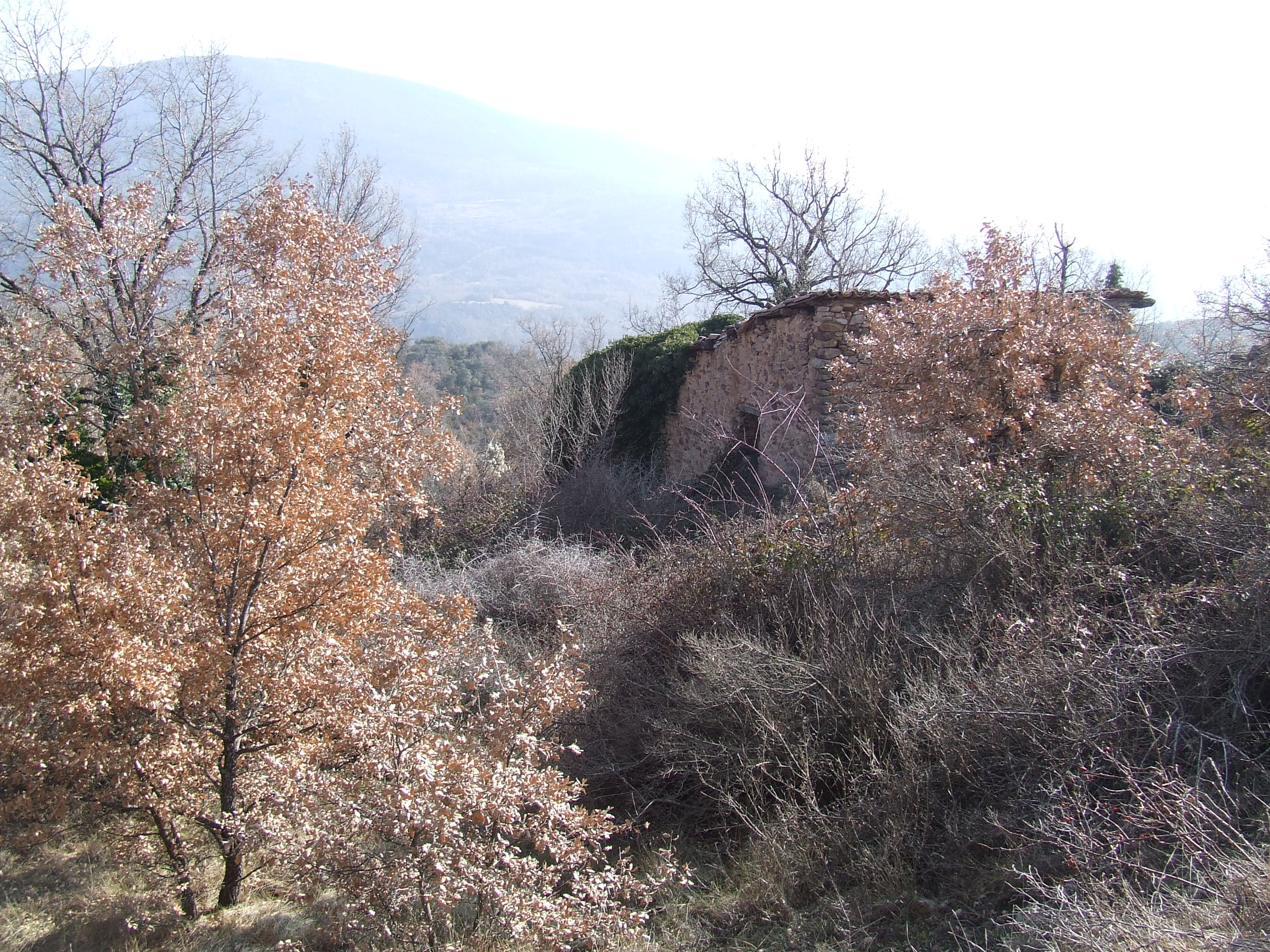 La Borda de Pau (Bordes d'Estavill, la Pobleta de Bellveí, la Torre de Cabdella, Pallars Jussà)